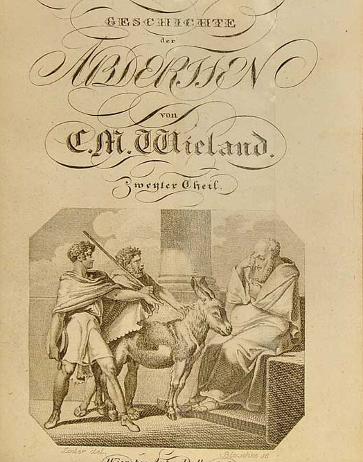 WIELAND, C.[hristoph] M.[artin]: Geschichte der Abderiten. 2 Theile [= Bde.]. Mit zwei gestochenen Titelvignetten. Wien: Doll (Drechsler) 1818. Kl.-8°. 340 [8], 281 [5] Ss. Neue Pergamentbände, mit Rückengoldtitel auf montierten Lederrückenschildchen einer älteren Bindung und Goldschnitt. Schmucker Satz dieser zweibändigen Ausgabe dieser erstmals zwischen 1774 und 1780 im "Teutschen Merkur" erschienenen Romansatire über Schildbürgerei. Die vom Wiener Kupferstecher Johann Blaschke auf Basis von Zeichnungen von Gottfried Locher klar und kräftig gestochenen Titelvignetten zeigen Szenen mit jenem Esel, dessen Schatten in der Überlieferung zum Streitobjekt eines absurden Gerichtsprozesses wird. – Sehr sauberer Satz im repräsentativen, sammelwürdigen Einband